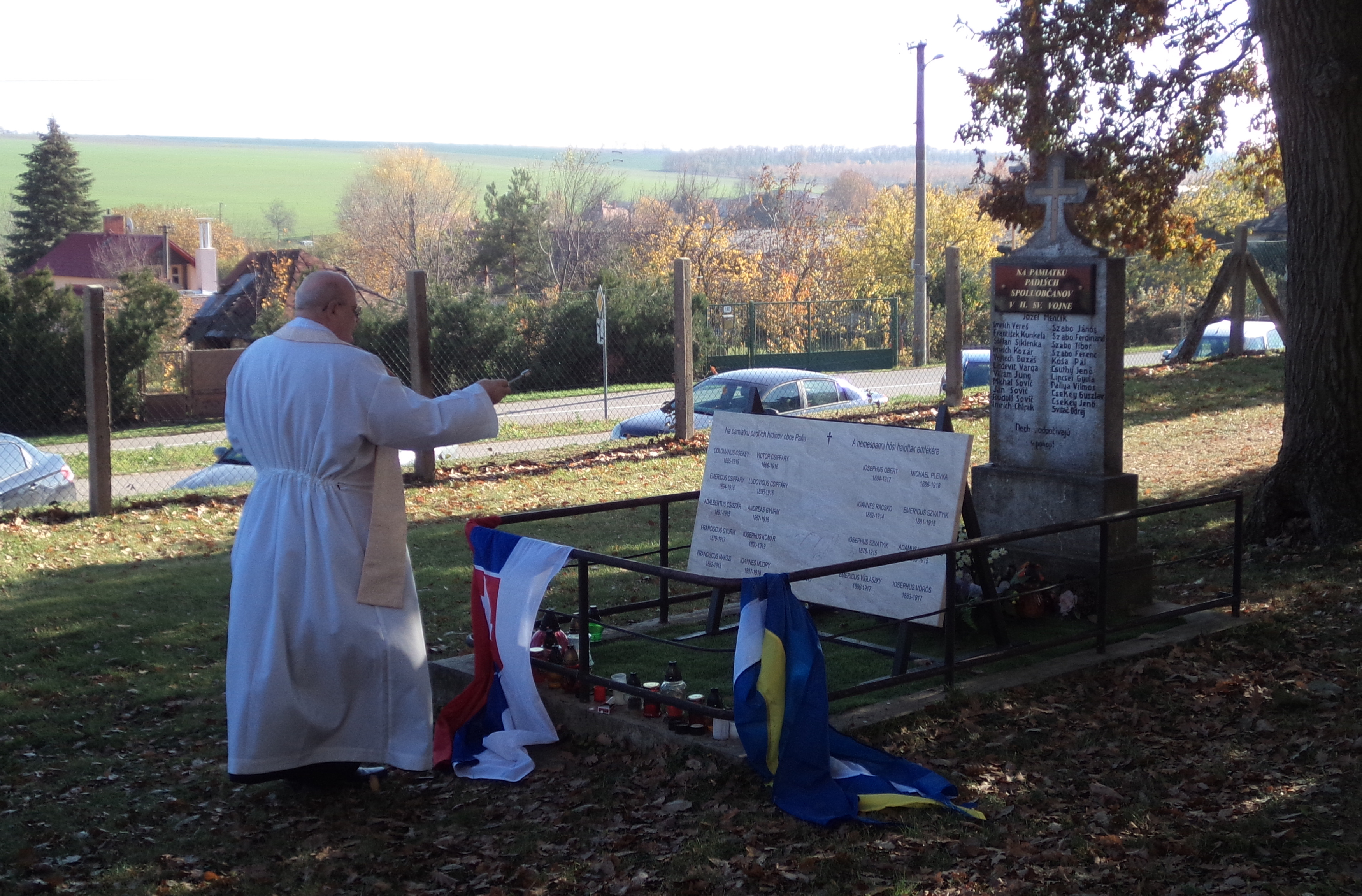 Nemespann 2018. november 4. első világháborús hősi halottak emléktáblájának megáldása